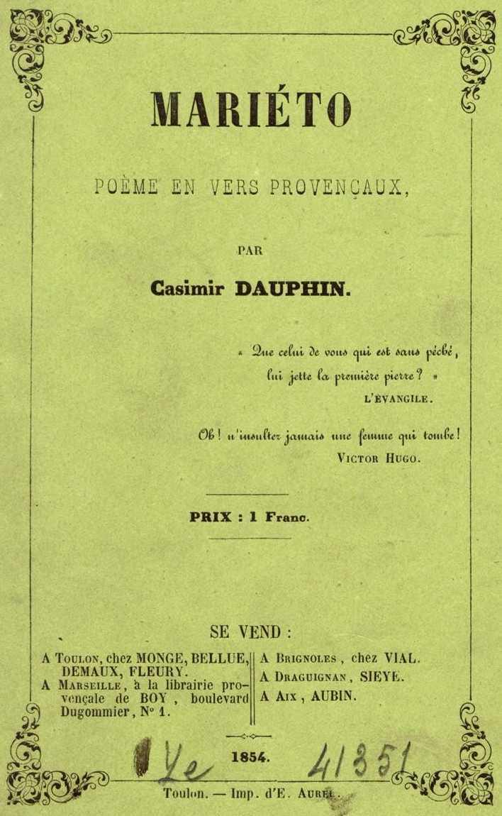 couverture d'un livre de dauphin